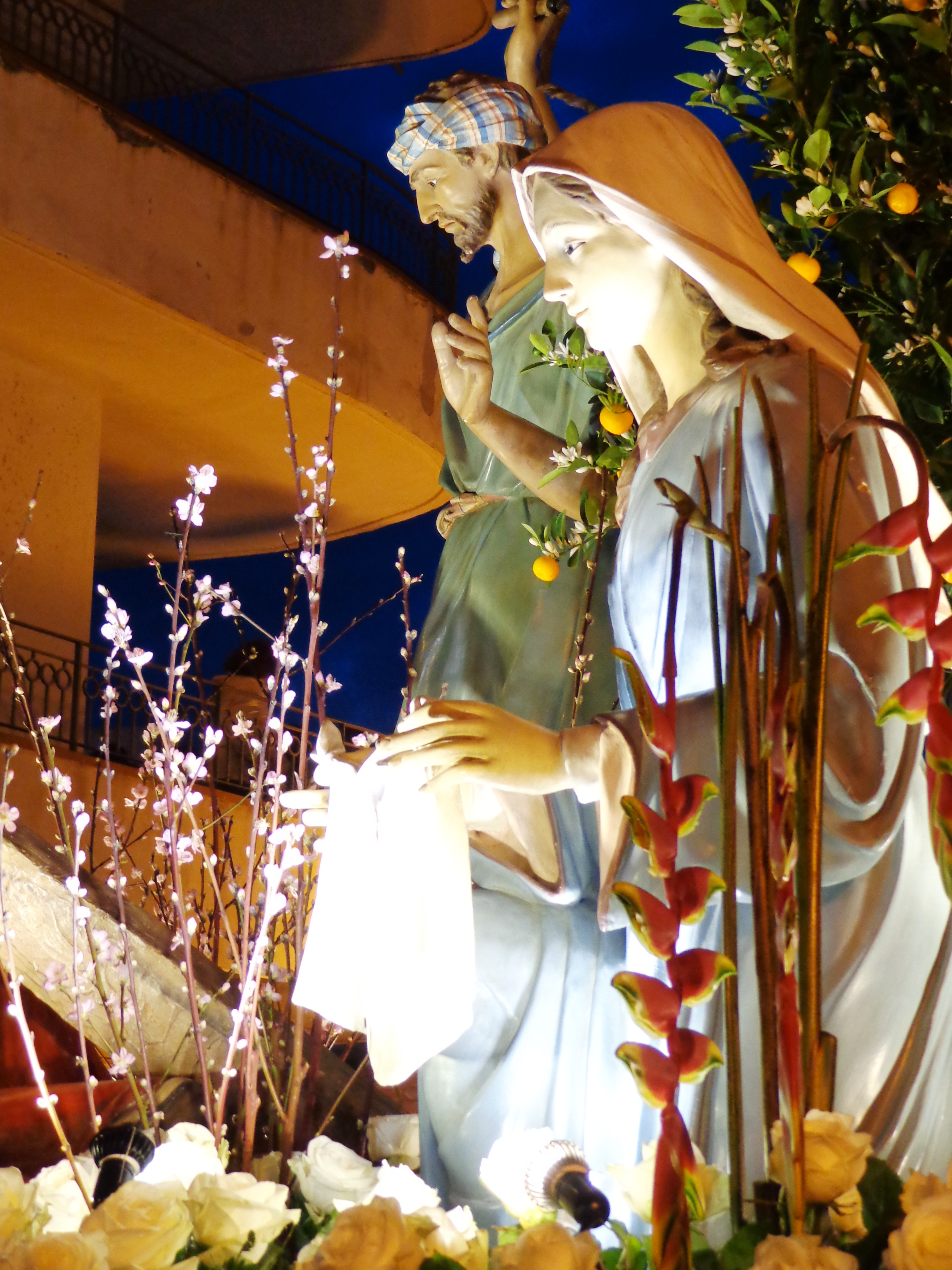 Varette_2015_18